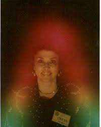 kirlian tekniği ile çekilmiş bir fotoğraf